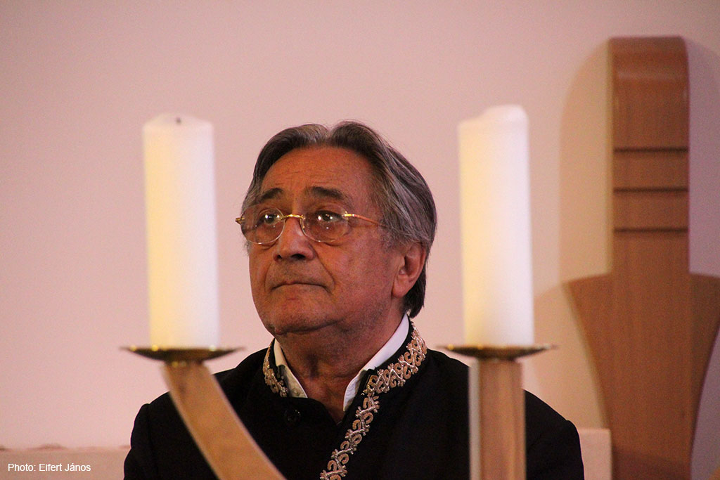 Csík Gusztáv (külföldön: Gusztav Csik) (Eger, 1943. február 6. –) eMeRTon- és Liszt Ferenc-díjas dzsesszzongorista.